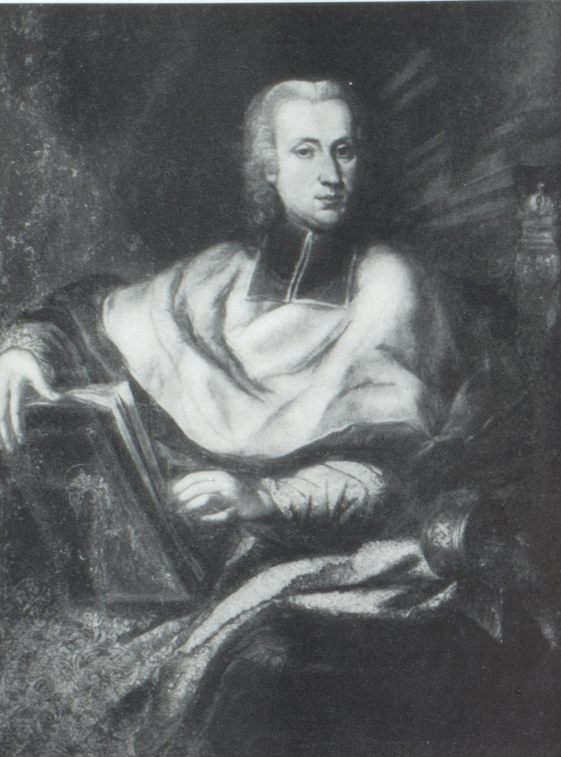 Leopold Anton von Podstatzky-Prusinowitz Reproduktion eines Ölbildes Unknown